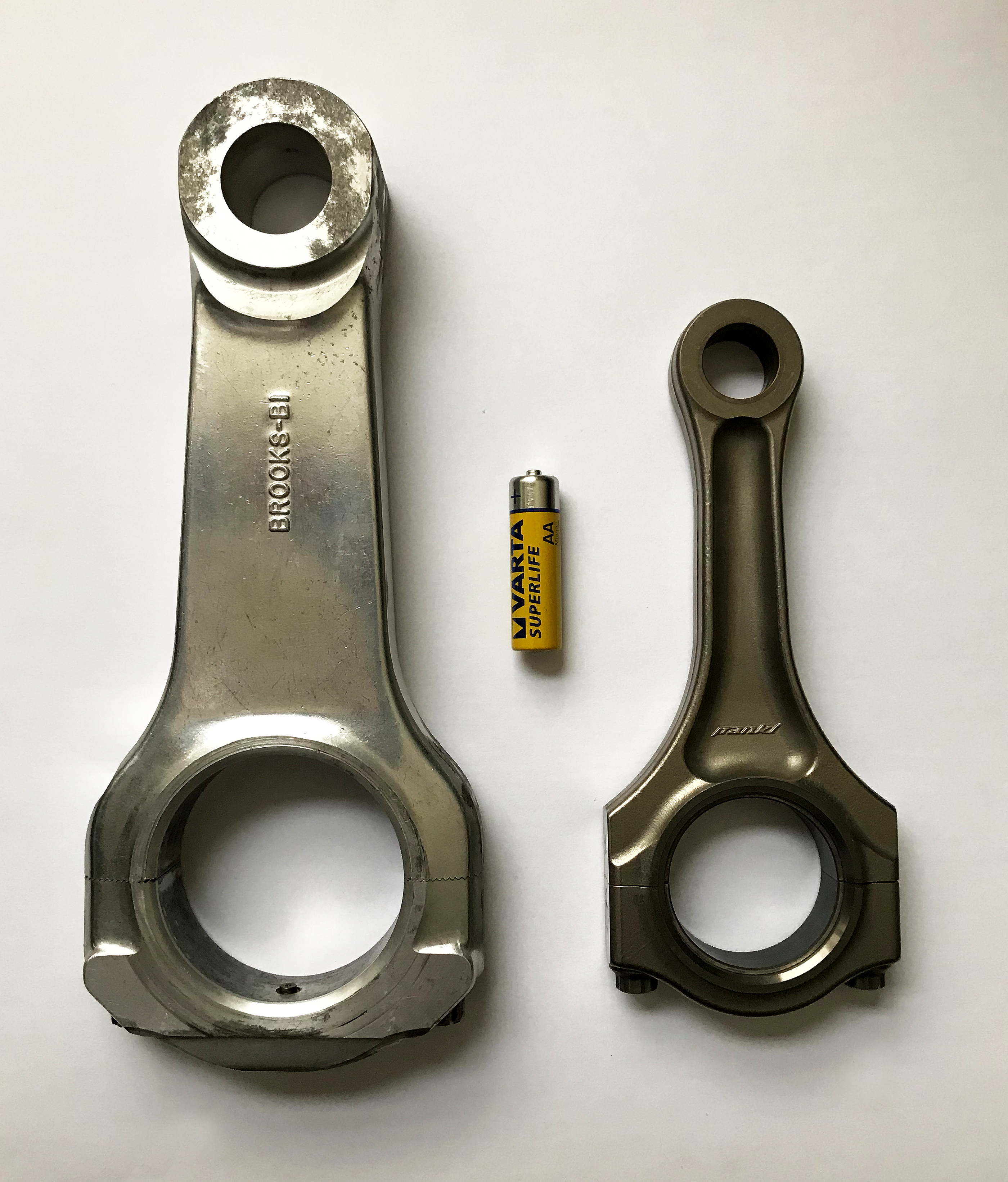 Pleuelstange eines Top Fuel Dragster neben dem eines Ferrari 458. AA-Batterie als Vergleich